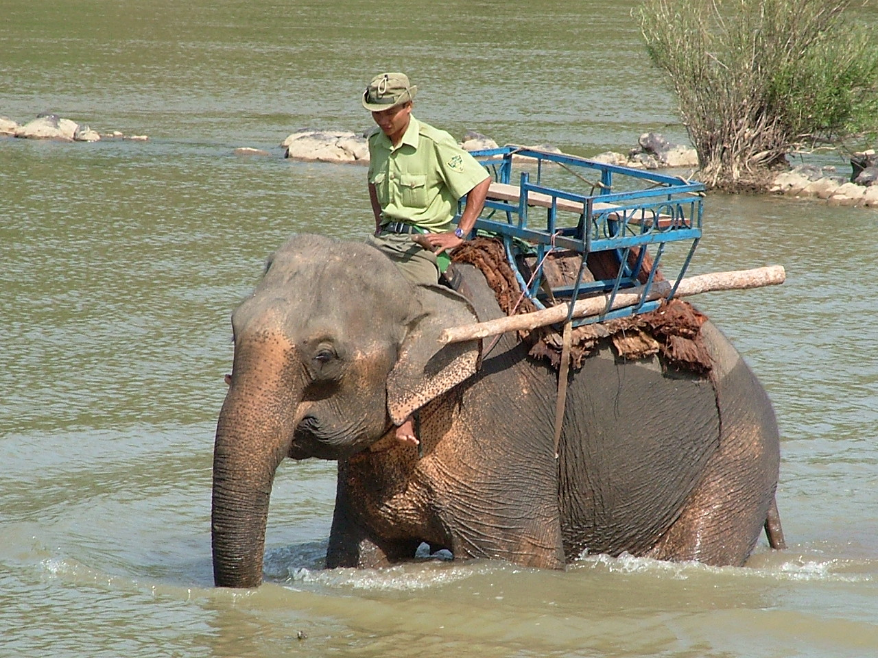 Tác giả: Đỗ Tuấn Hưng. Nguồn: Ảnh tự chụp. Nội dung hình: Kiểm lâm vườn Yók Đôn.